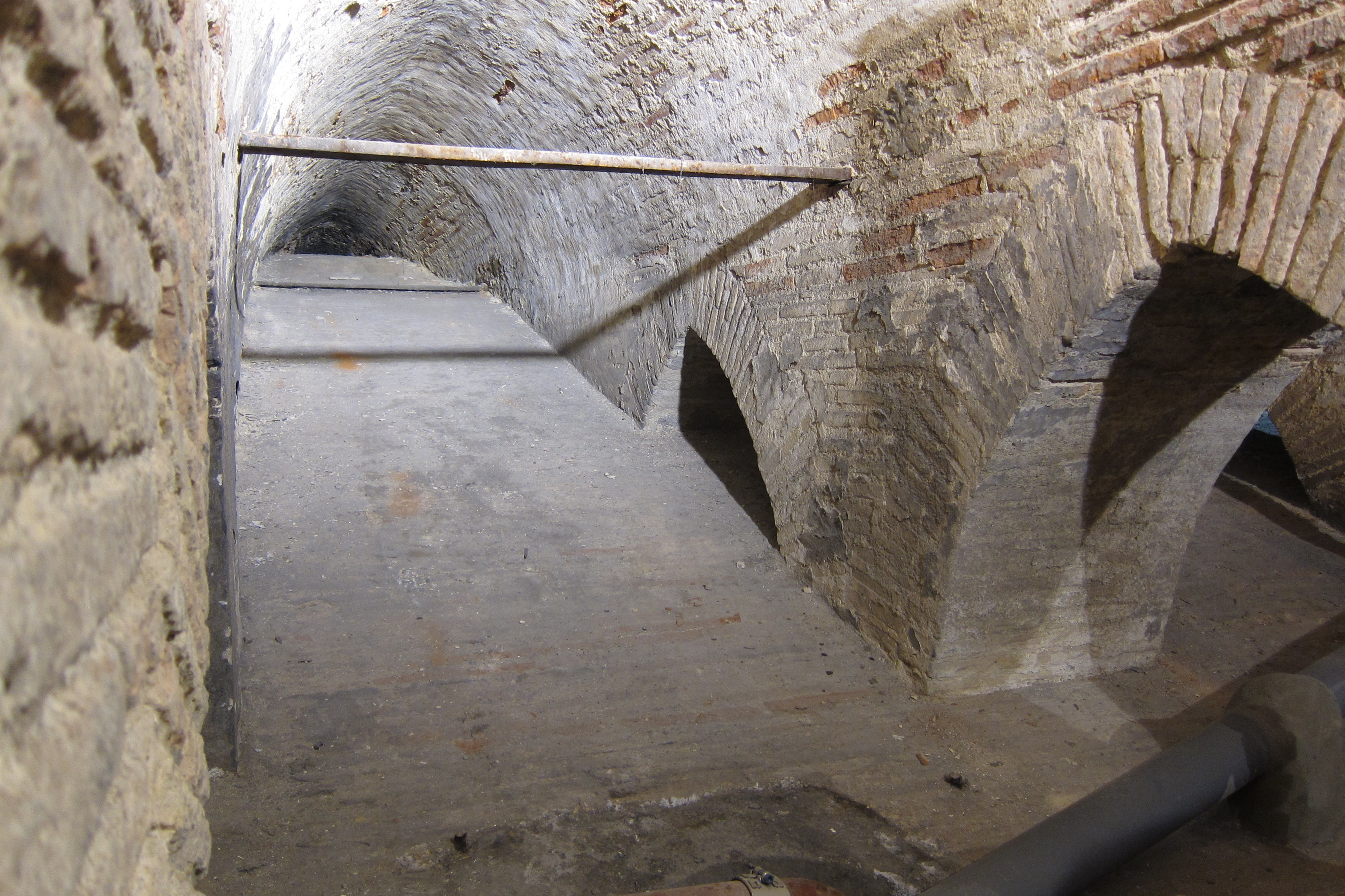 Vue depuis une pile du pont. Au fond, passage en direction de la pile de la suivante. .